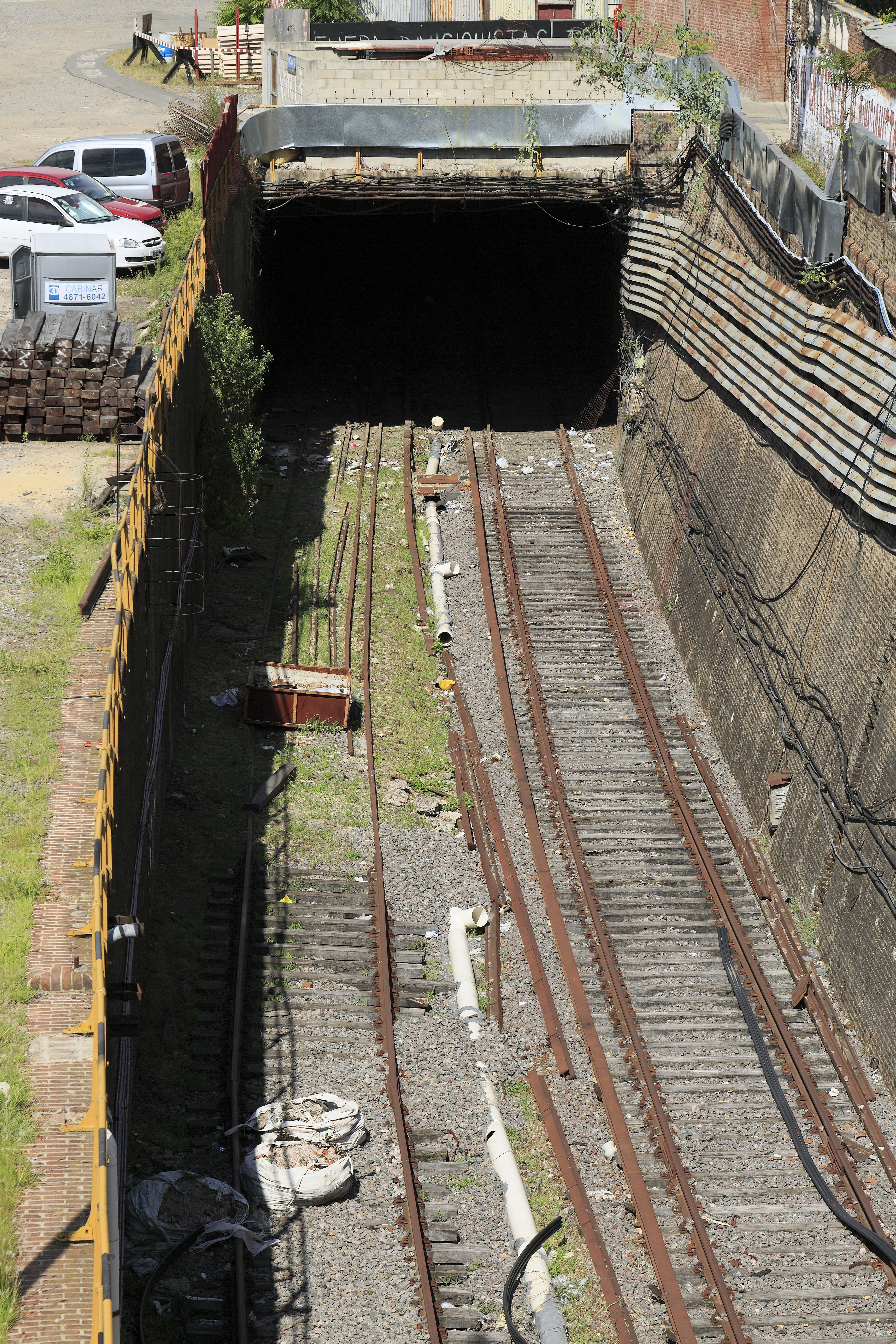 Von der Fußgängerbrücke im Zug der Calle Sánchez de Bustamente Richtung Osten, die beiden südlichen Gleise der seit Caballito viergleisigen Strecke der Línea Sarmiento führen hier in den Tunnelbahnhof Plaza Miserere. Dort würden ideale Anschlüsse zur U-Bahn-Linie A Richtung Stadtzentrum bestehen, jedoch ist die Anbindung schon einige Jahre außer Betrieb.